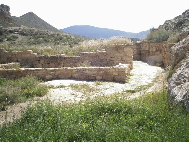 Contrebia Leukade Parte Alta.